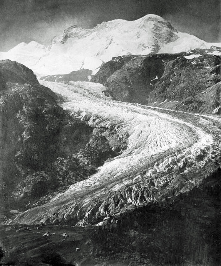 Der Bodengletscher, ehemaliger unterer Abschnitt des Gornergletschers, aufgenommen im Jahr 1855 vermutlich von Frédéric Martens (um 1805–1875). Aufgenommen von der Hubelwäng, im Hintergrund von links Castor, Pollux und Breithorn.